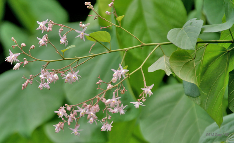 Bola - Kleinhovia hospita in Kolkata, West Bengal, India.